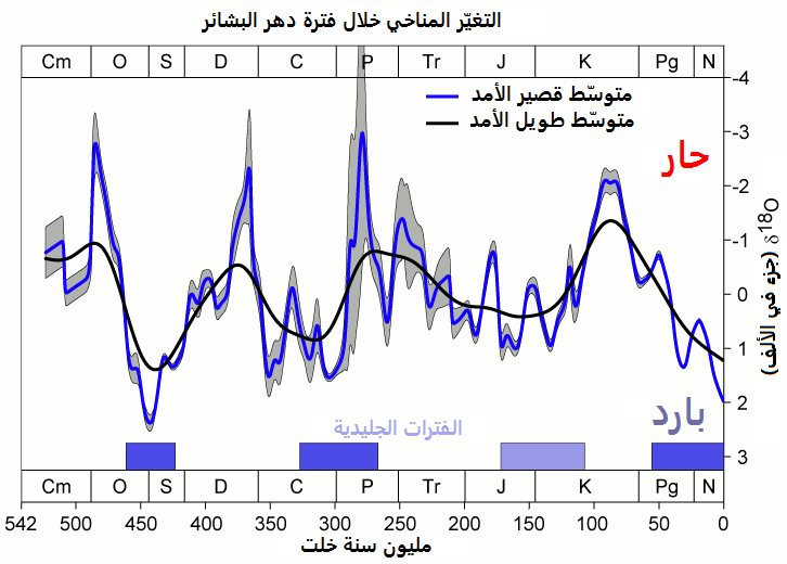 مخطط بياني للتغير المناخي خلال فترة عهد البشائر اعتماداً على تفاوت تركيز أكسجين-18 في المناخ